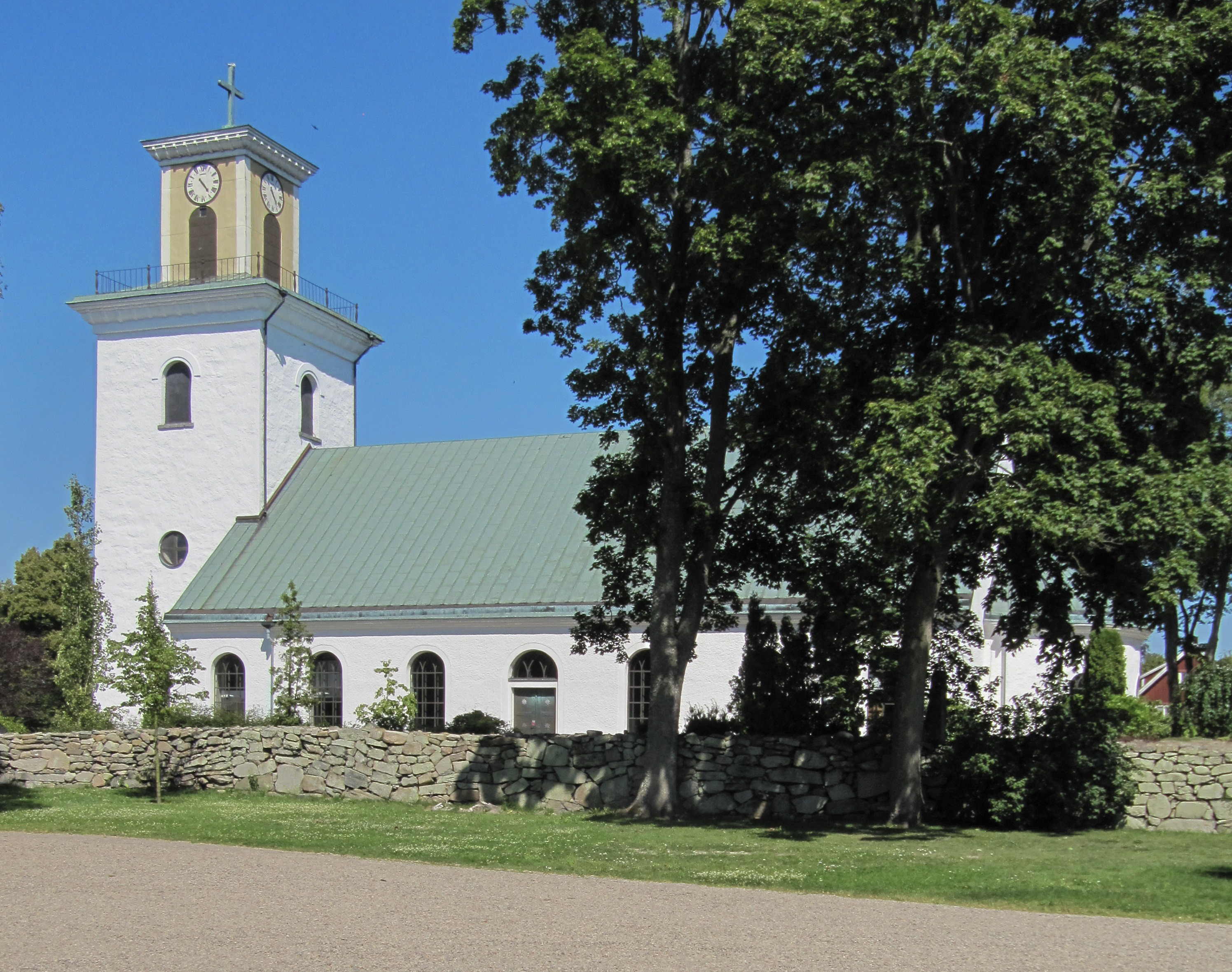 Mörrums kyrka från söder